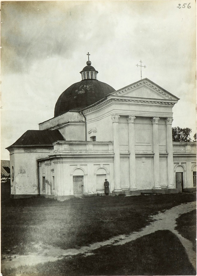 Беларуская (тарашкевіца): Магілёў (Mahiloŭ), завулак Фарны (zavułak Farny). Касьцёл Сьвятога Казімера (Фара)